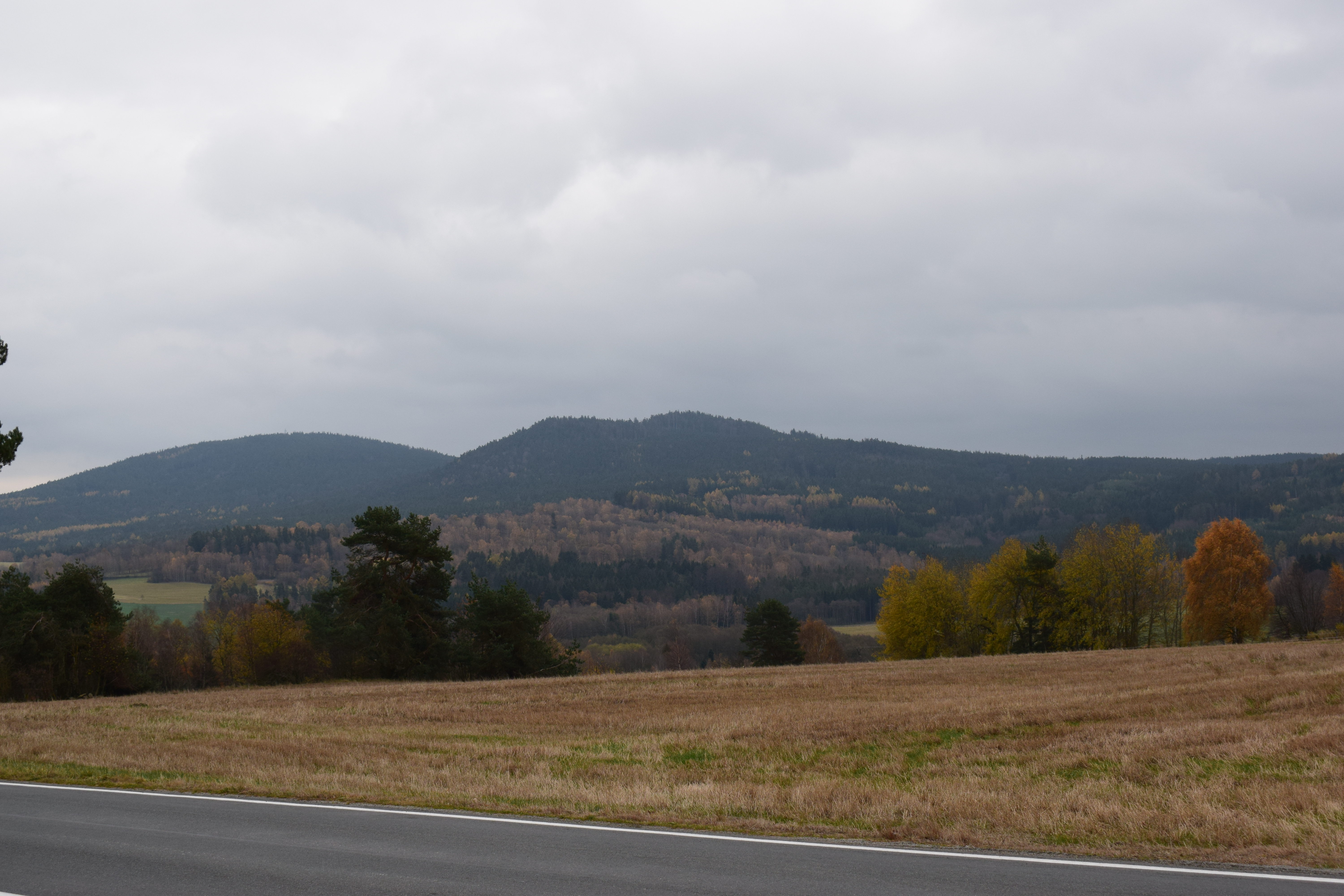 Kraví hora vlevo vzadu a Kuní hora uprostřed vepředu od silnice mezi Rychnovem u Nových Hradů a Benešovem nad Černou